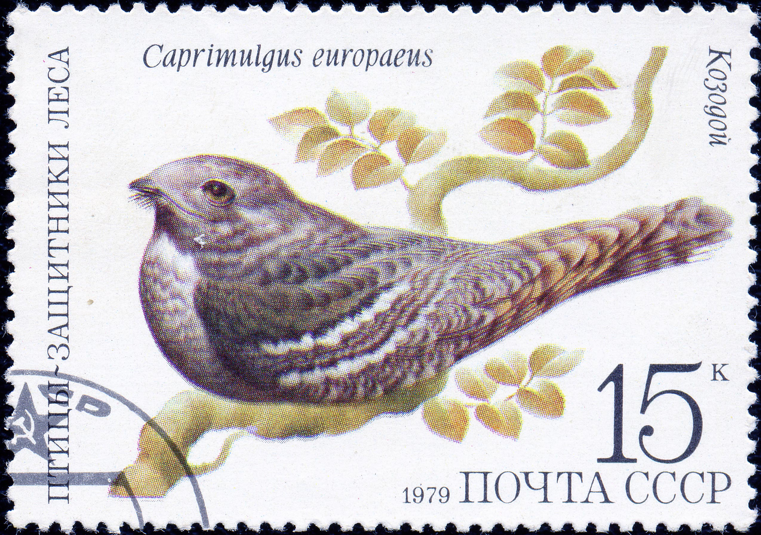 Почтовая марка СССР. 1979. Козодой